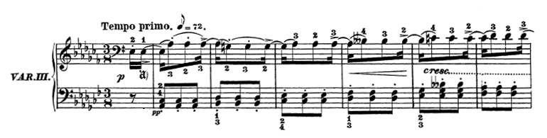 Compassos iniciais do primeiro movimento da Sonata Op. 26 de Beethoven - Variação III